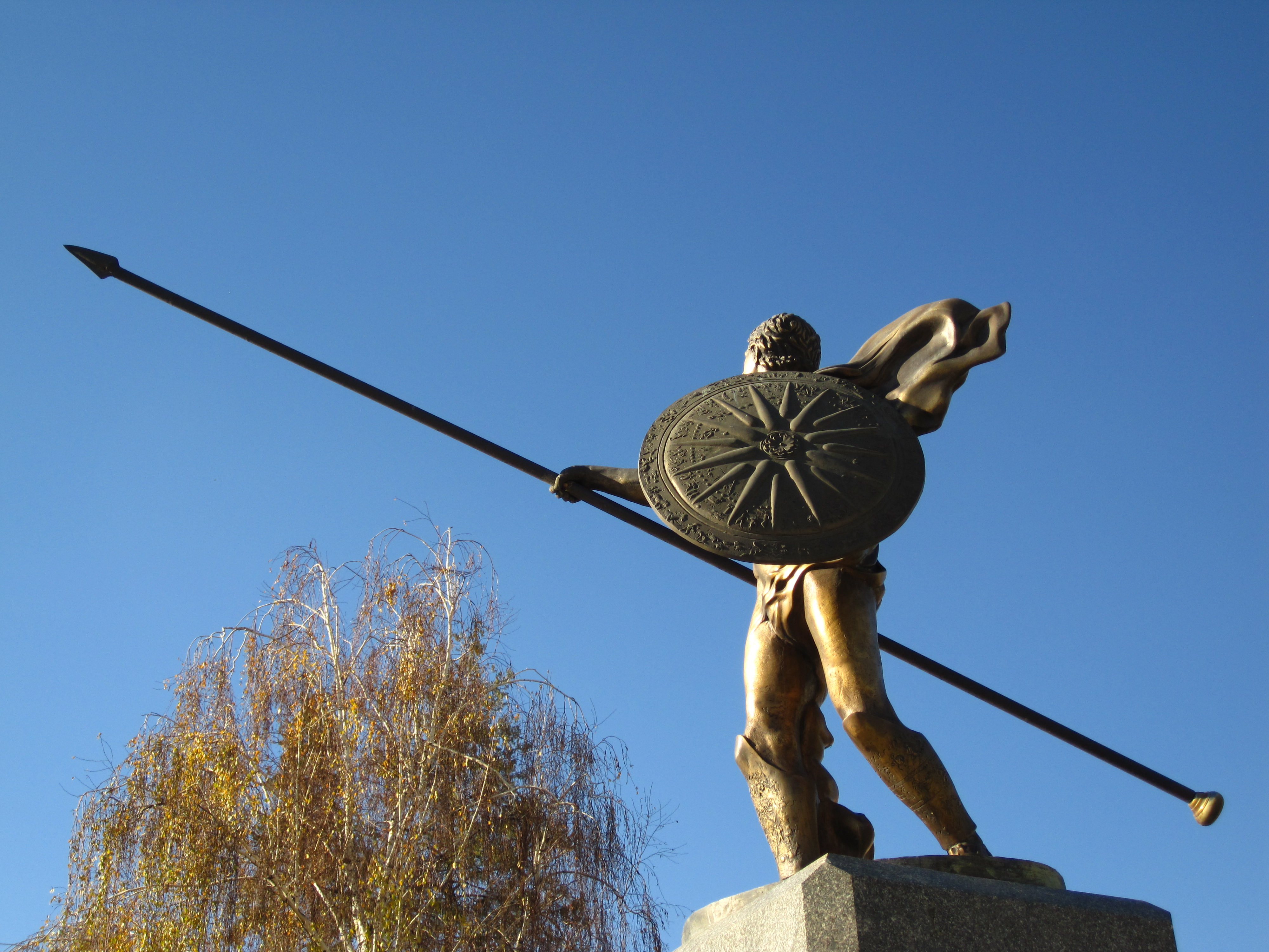 Споменик - Александар III Македонски - Прилеп